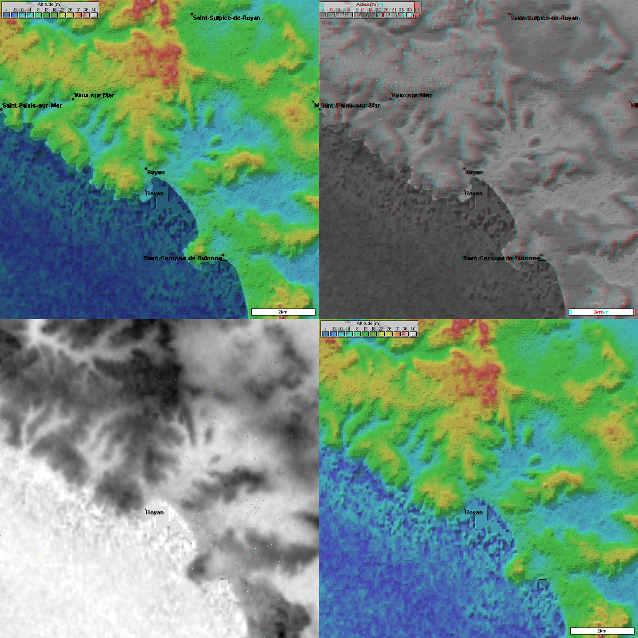 4 images topographique (10 km de coté) de Royan prisent par la mission SRTM. Image topographique + position des villes image topographique en relief + position des villes image topographique en niveau de gris (utile pour displacement map dans les logiciel 3D) Image topographique sans les villes Générée par le logiciel Radiomobile à partir des données domaine public de la mission SRTM de la NASA.